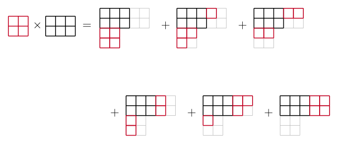 Exemple rectangulaire de fonction de Schur